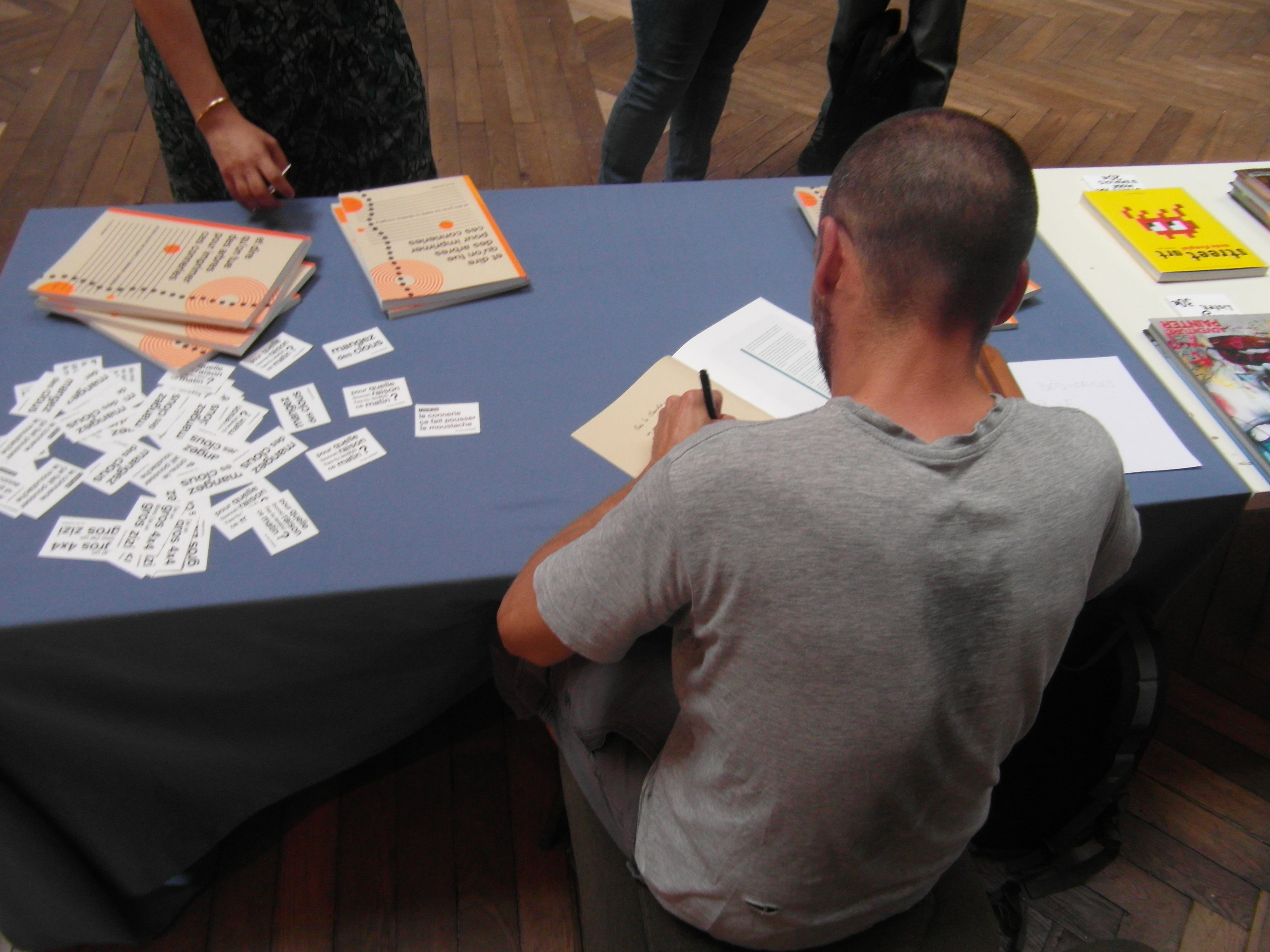 L'artiste Cobie signant des dédicaces lors du GSAFest 2018